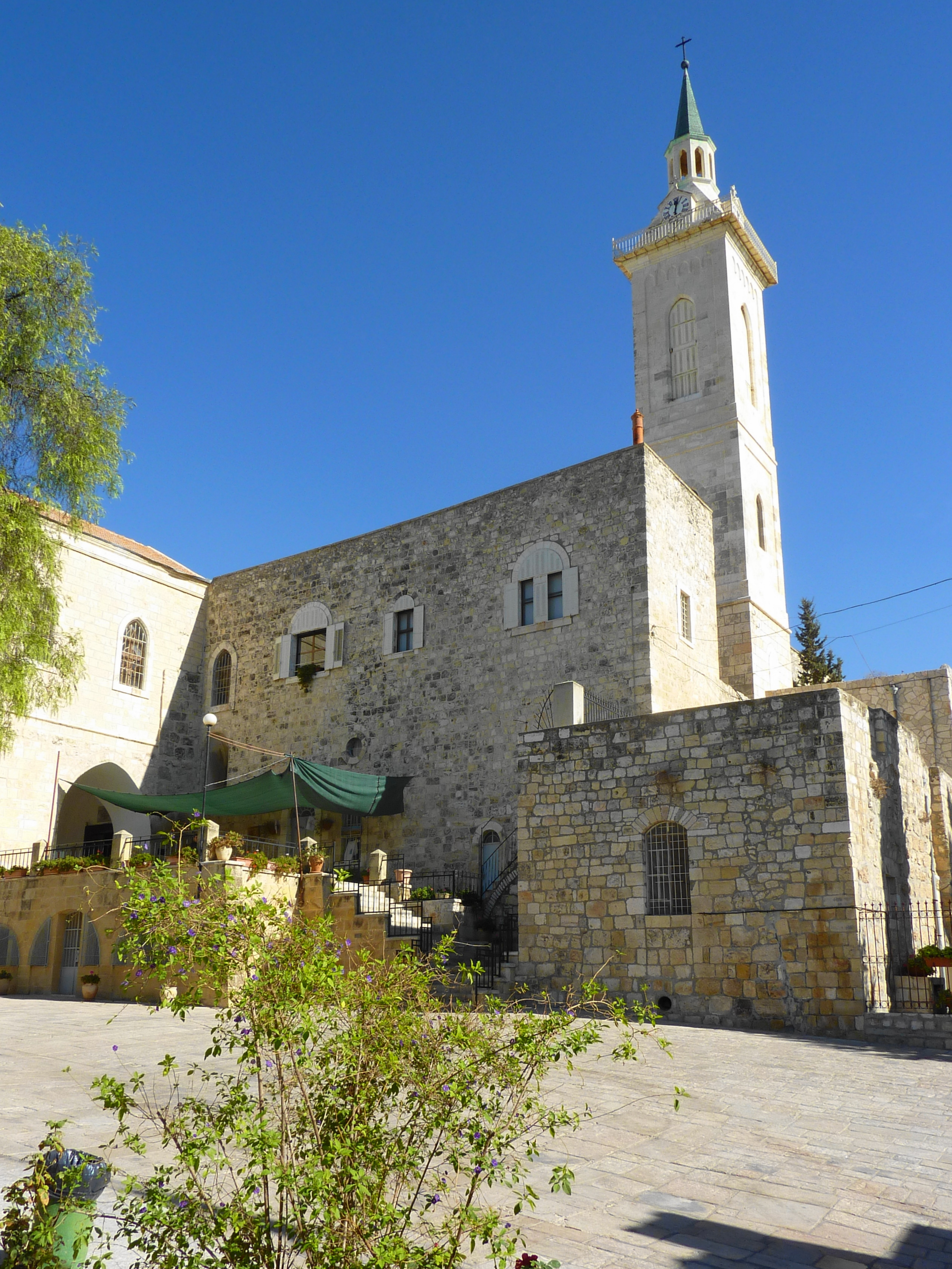 P1220781 Jerusalem